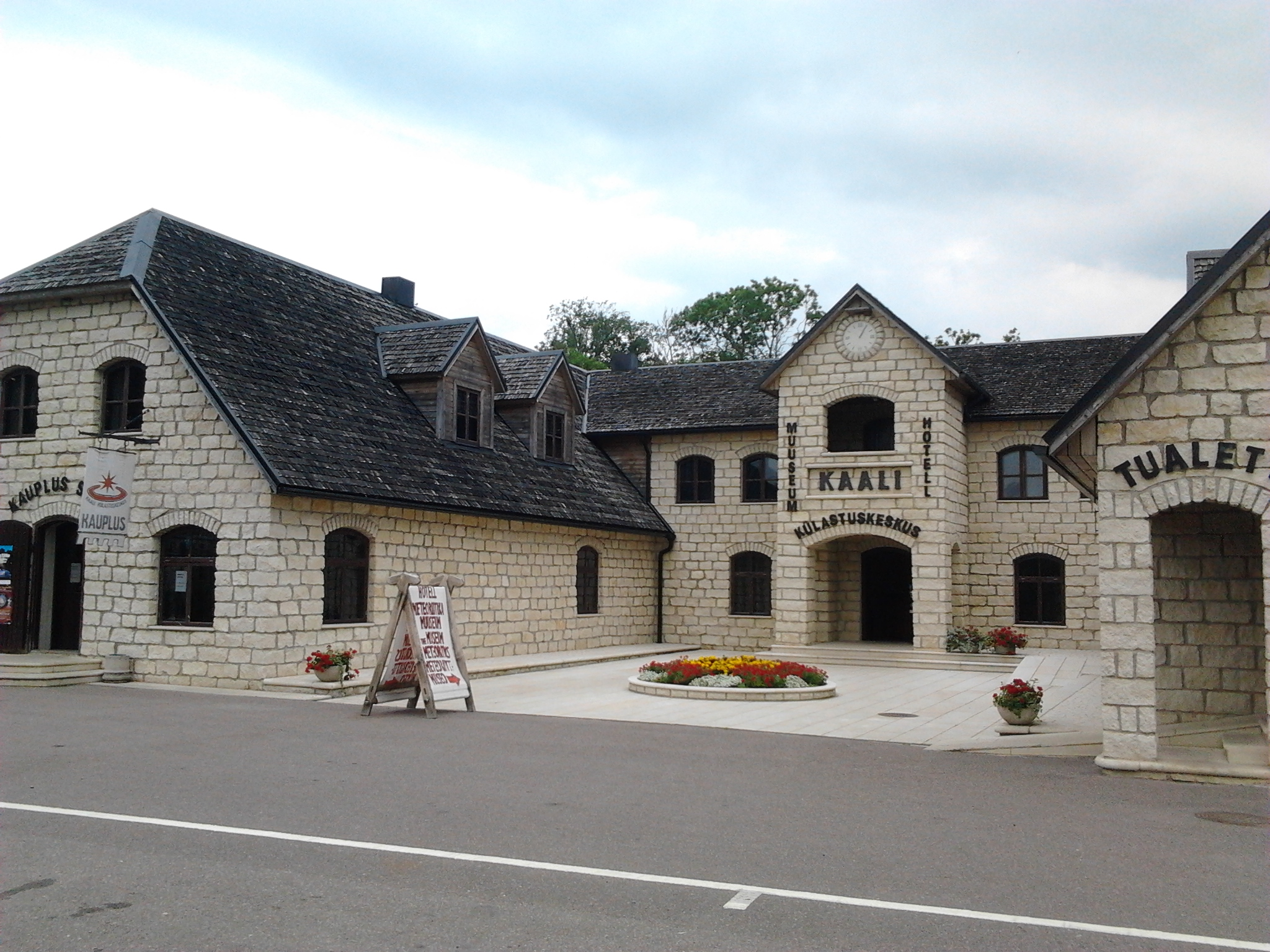 Kaali külastuskeskus 2012-08-03 16.48.08